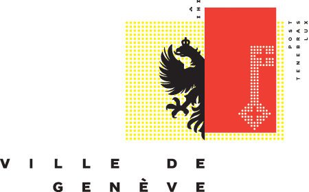 Identité visuelle de la Ville de Genève